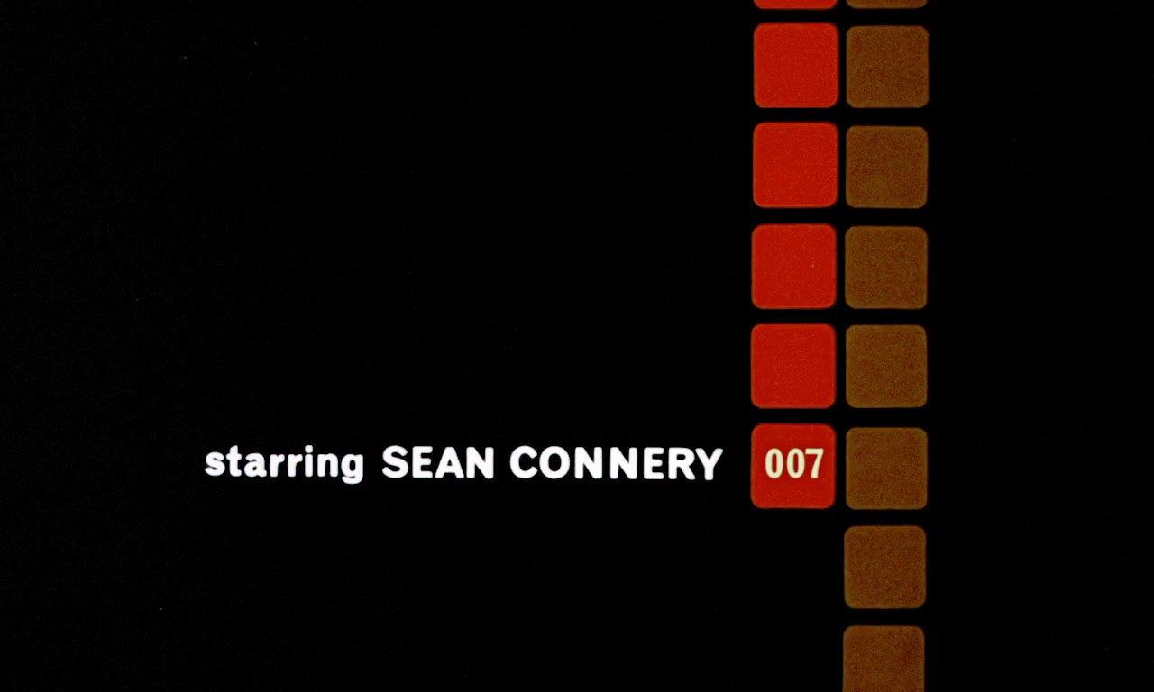 Заставка британского шпионского фильма 1962 года «Доктор Ноу».